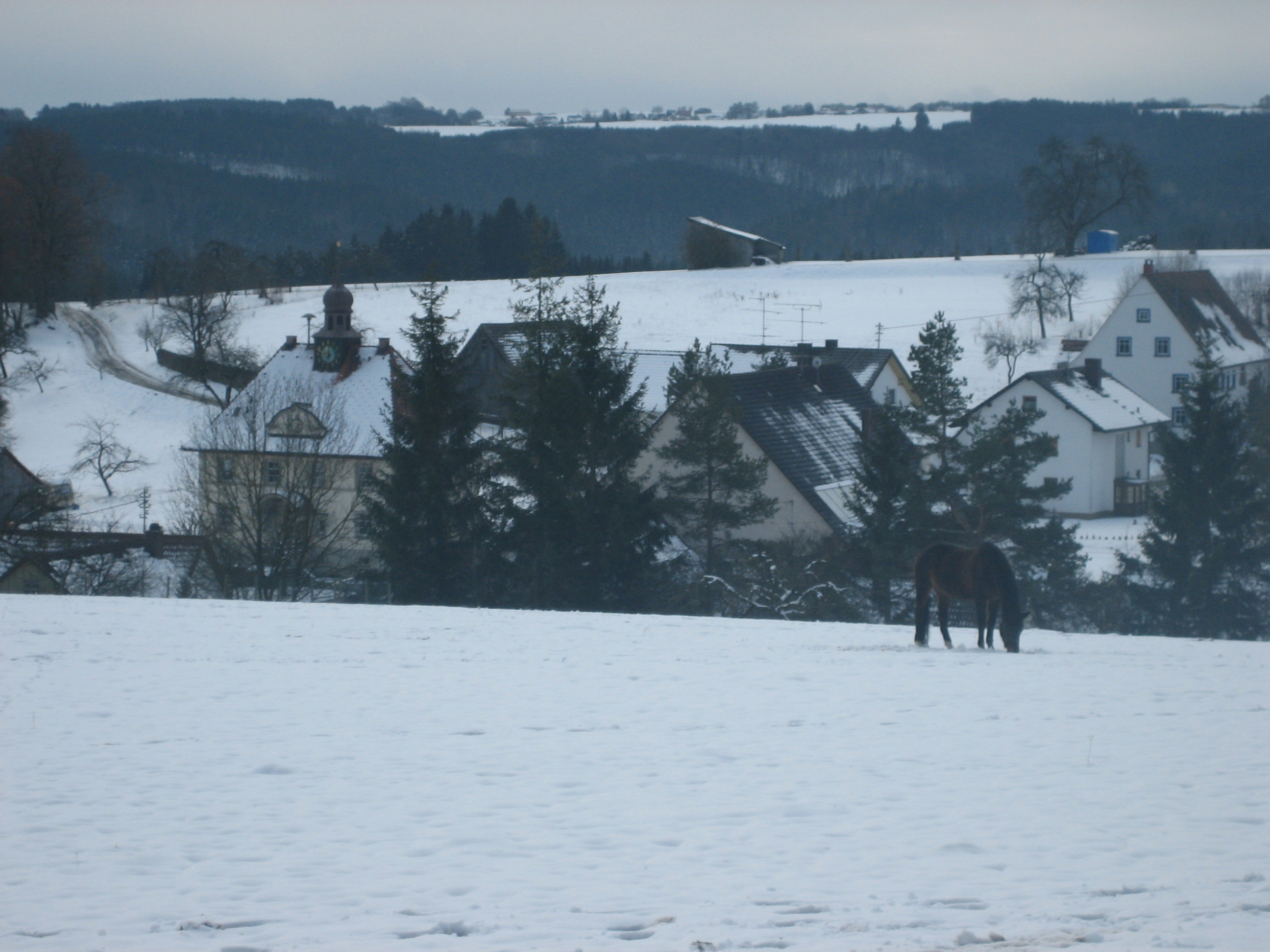 Blick über Bachheim